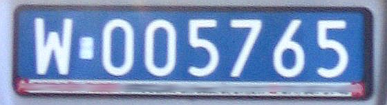 polska tablica rejestracyjna pojazdu zarejestrowanego dla konsulatu Republiki Federalnej Niemiec we Wrocławiu